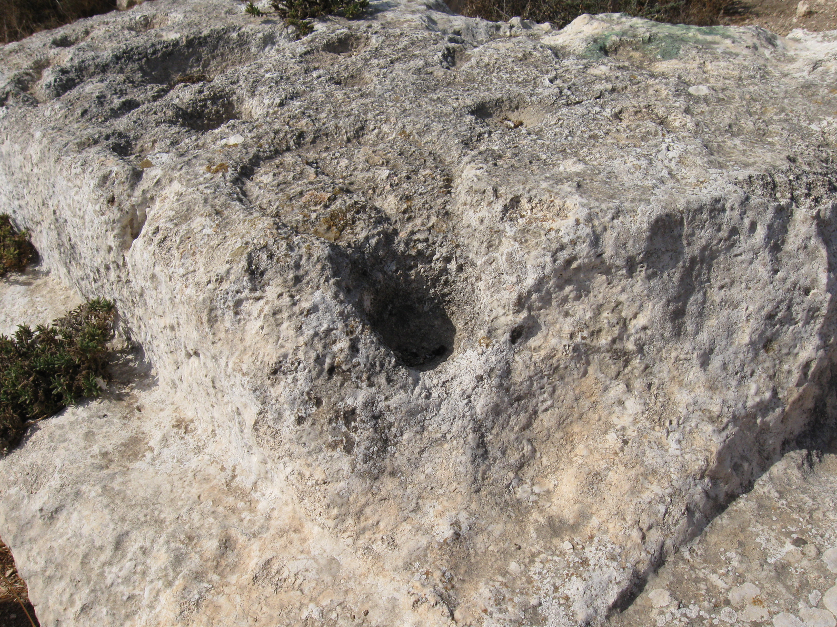 פני מזבח מנוח